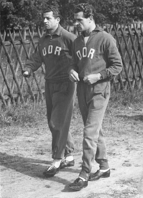 Zentralbild-Beyer-Dressel Bey-Qu 18.9.1957 Fußballer bereiten sich auf Waliser Länderspiel vor Die Fußball-Nationalmannschaft, die in der kommenden Woche das Weltmeisterschafts-Qualifikationsspiel gegen Wales in Cardiff austrägt, ist in der Sportschule Kienbaum bei Berlin, um sich auf die große Aufgabe vorzubereiten. Die Mannschaft wird am Donnerstag, dem 19.9.1957, im Berliner Walter-Ulbricht-Stadion ein Übungstreffen austragen. UBz. Vor einem Waldlauf unterhalten sich der Wismut-Mittelstürmer Willi Tröger (links) und Mittelverteidiger Kurt Zapf (Empor Rostock).